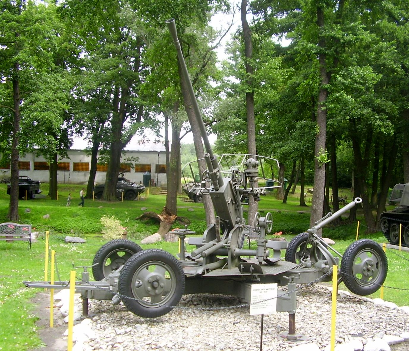 37 mm armata przeciwlotnicza wz. 1939 (61-K)